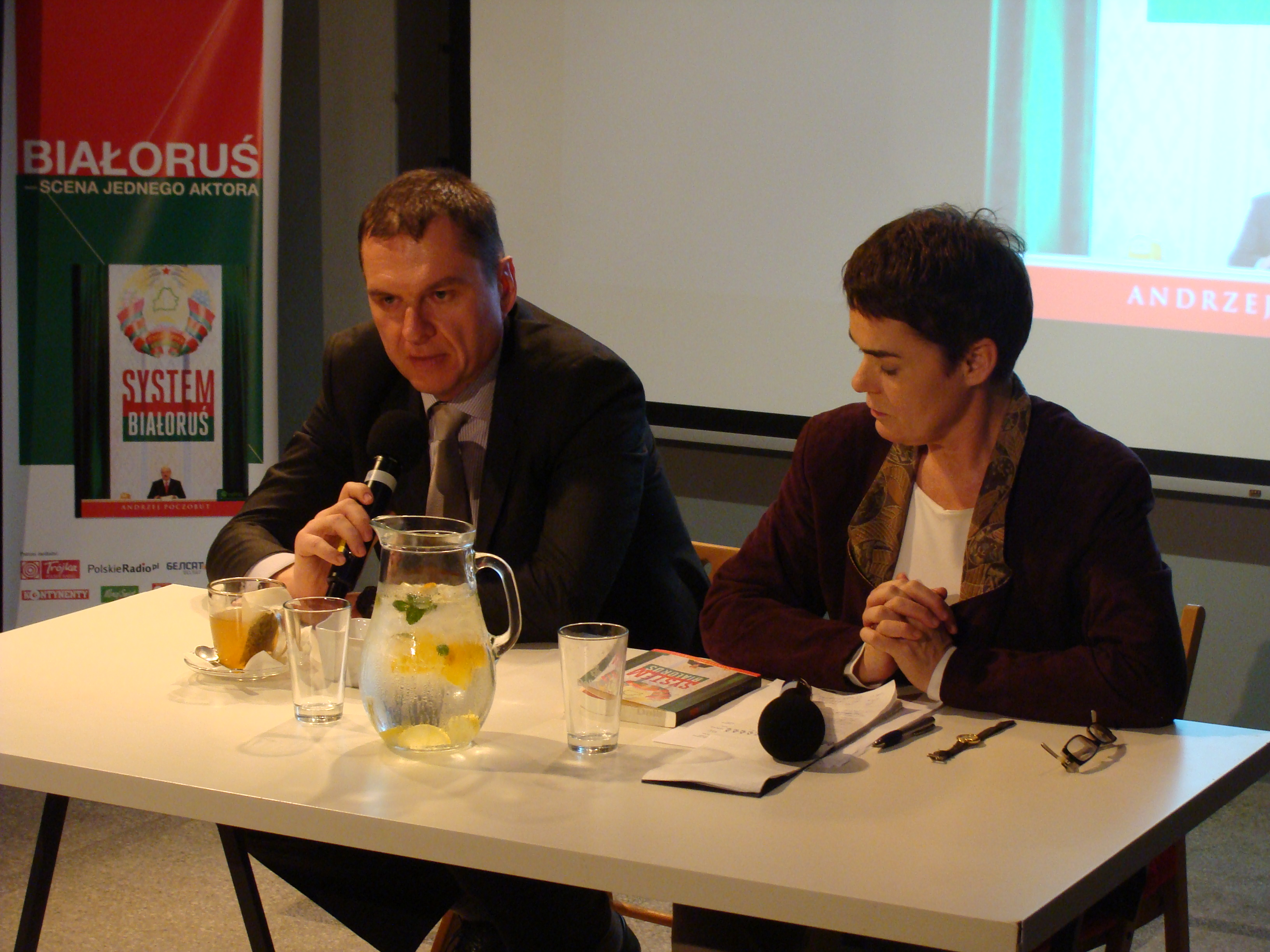 Białoruski dziennikarz polskiej narodowości, działacz Związku Polaków na Białorusi Andrzej Poczobut oraz Maria Przełomiec podczas prezentacji książki "System Białoruś" w Warszawie.